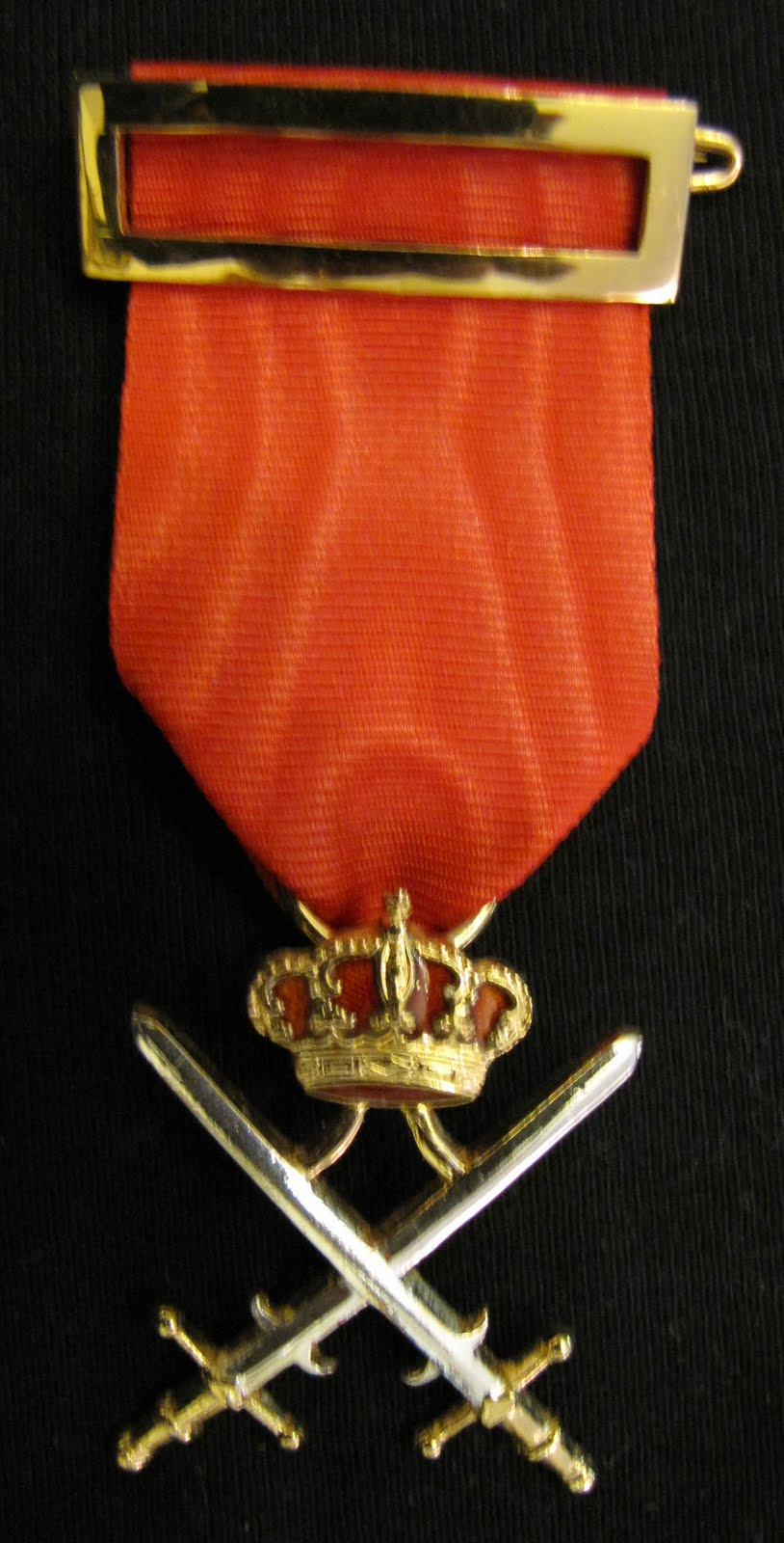 Miniatura de la medalla o venera corporativa de la Real Asociación de Hidalgos de España.